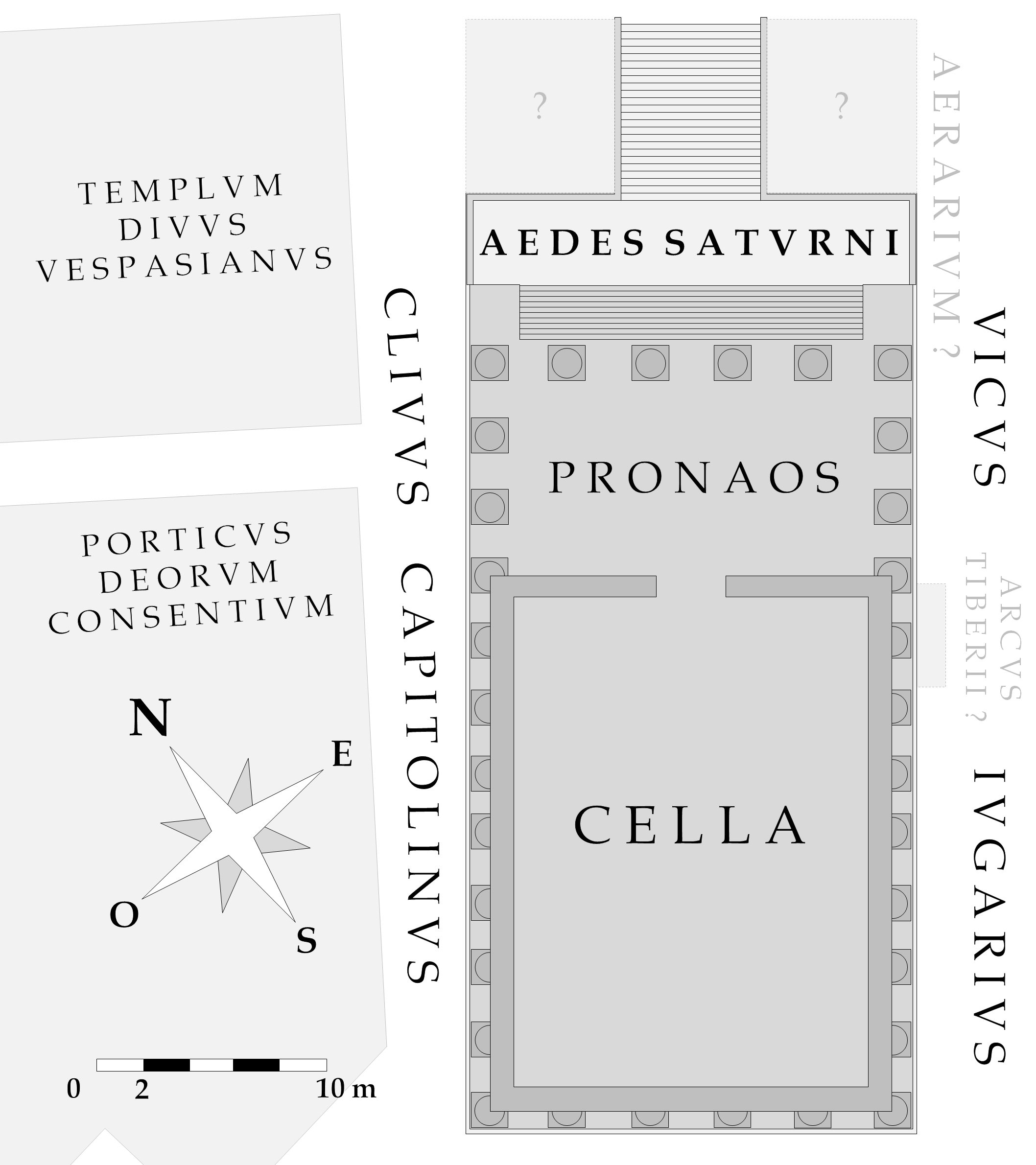 Plan du temple d'Apollon Sosianus D'après : - Stamper, The architecture of roman temples, 2005 - Richardson, The Approach to the Temple of Saturn in Rome, AJA, 1980 - Patrizio Pensabene, Tempio di Saturno : architettura e decorazione, 1984